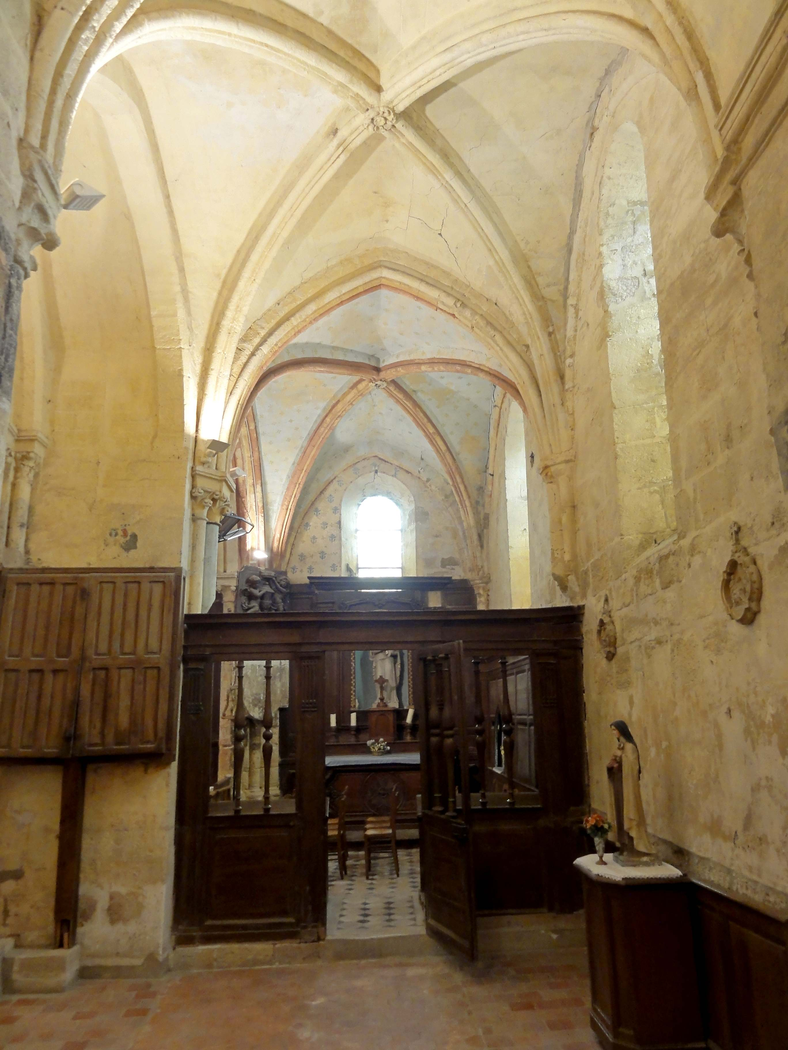 Intérieur de l'église (voir titre).